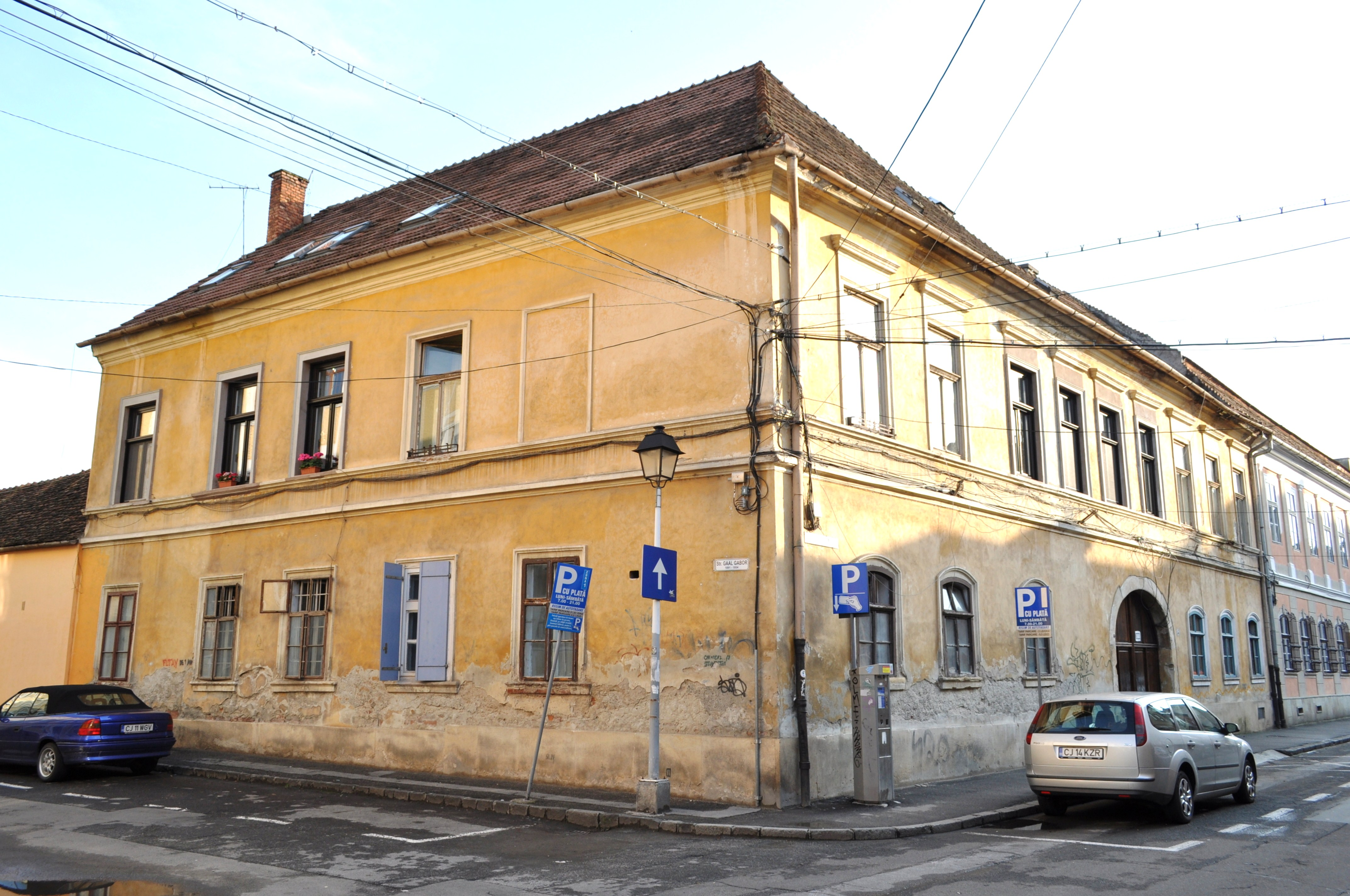 Casă monument strada I.C.Brătianu nr.24